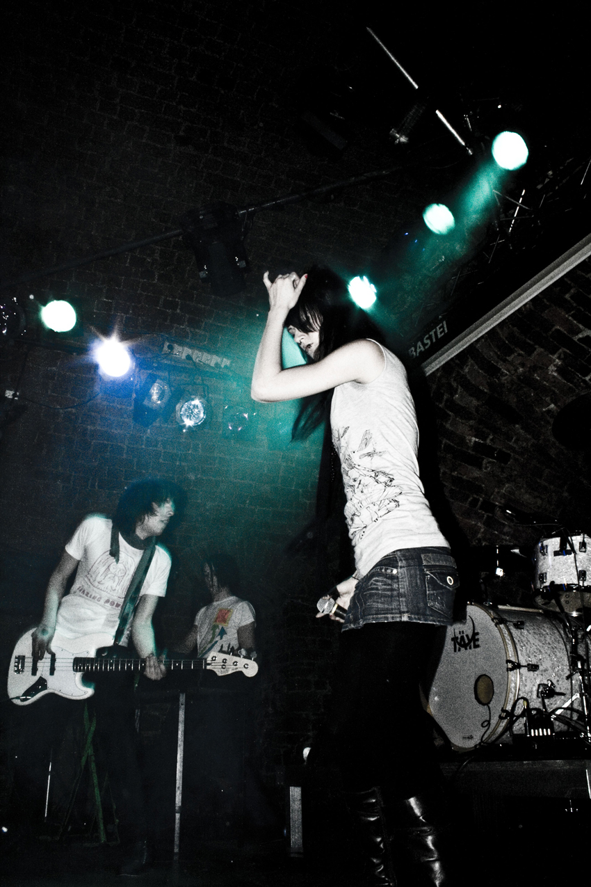 Jennifer Rostock performing